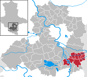 Verwaltungsgemeinschaft Leuna-Kötzschau in Sachsen-Anhalt - Saalekreis